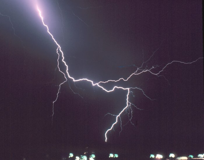 Ligntning